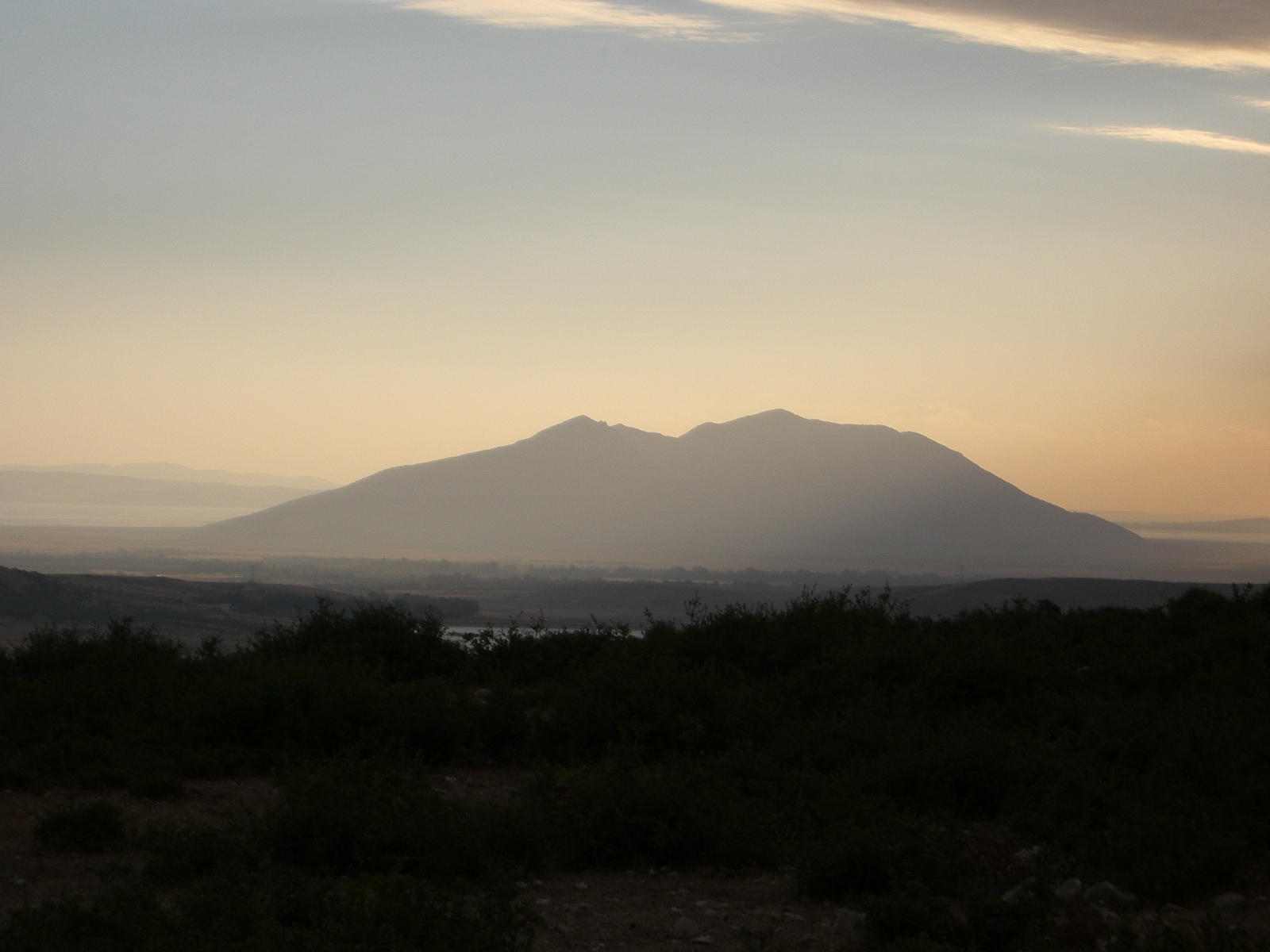 Vue matinale de la montagne dominant le parc Ichkeul. Le lieu de la prise de la photo est Ghezala. Auteur : Dhfaouzi